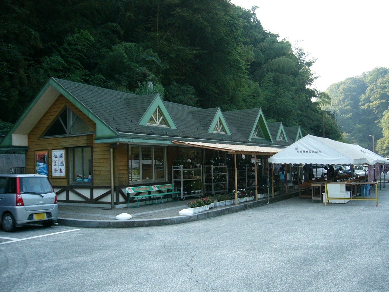 Michinoeki Yamakita (道の駅山北 Kanagawa)